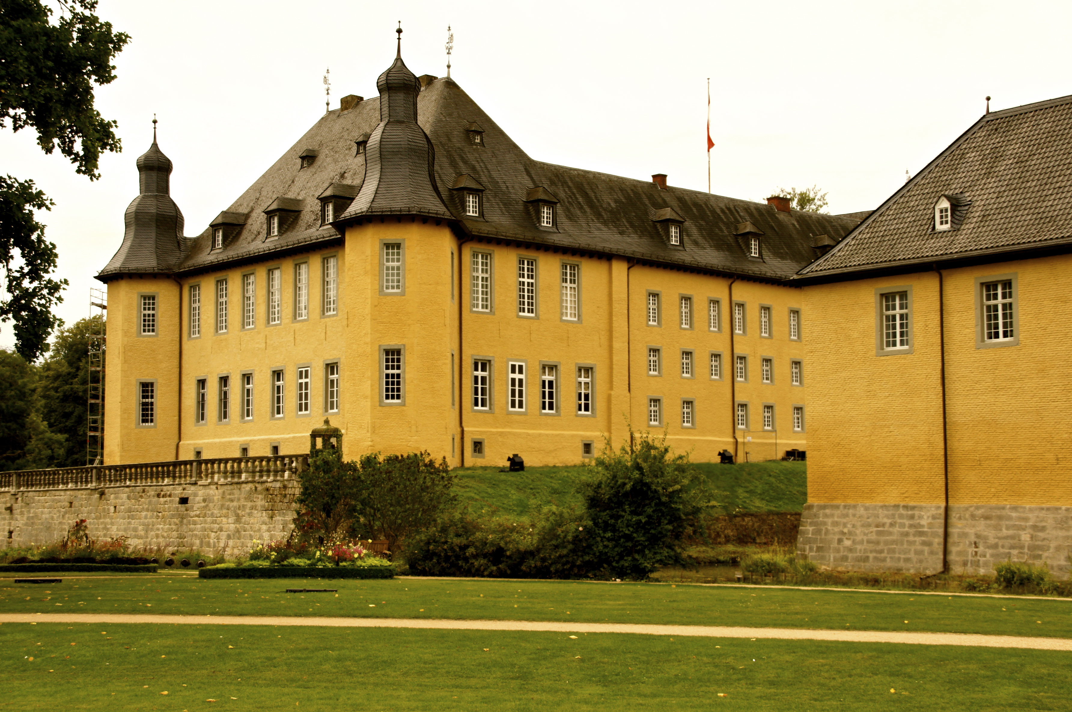 Erste urkundliche Beweise über eine Befestigungsanlage an der Stelle des heutigen Schlosses gibt es aus dem Jahre 1094. Ein Hermannus de Dicco war danach Besitzer der damals noch sehr einfachen Burg. 1383 wurde dem damaligen Besitzer Gerhard von Dyck, genau wie so vielen anderen Rittern am Niederrhein Raubrittertum vorgeworfen. Seine Burg wurde eingenommen und zerstört, doch 10 Jahre später hatte man sie wieder errichtet. Ab 1645 wurde sie durch den kurkölnischen Oberst Ernst Salentin von Salm-Reifferscheidt-Dyck schlossartig ausgebaut. 1961 wurde die gesamte Anlage restauriert und auch die Schäden des 2. Weltkrieges beseitigt. Die wirklich sehenswerte Parkanlage wurde am 1794 von Fürst Joseph Salm-Reifferscheidt-Dyck im Stile eines englischen Gartens gestaltet. Das Schloss liegt zwischen Steinforth und Aldenhoven am Niederrhein. Das betreten der Anlage kostet Eintritt - für meine Erfahrung ein exorbitant hohen Eintrittspreis. Kaum ein anderes Schloss langt derart massiv zu, zumal das fotografieren in den Räumen verboten ist oder man zahlt dafür noch einmal einen extra Obolus!!! (modernes Raubrittertum) Johannes Heribert Pohl